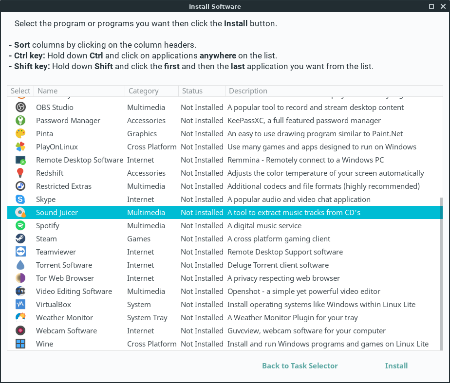 Das Programm von Linux Lite 3.0, mit dem besonders leicht populäre zusätzliche Programme installiert werden können.